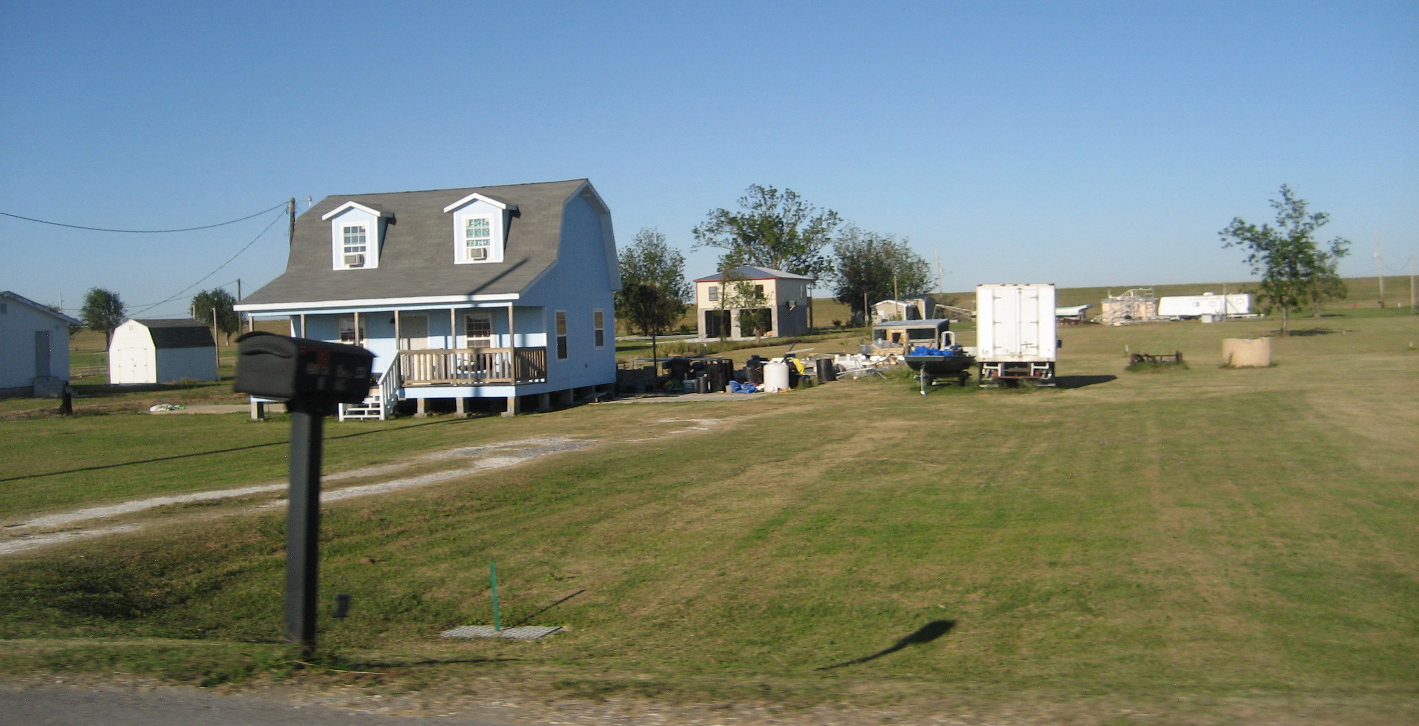 Boothville, Plaquemines Parish, Louisiana.